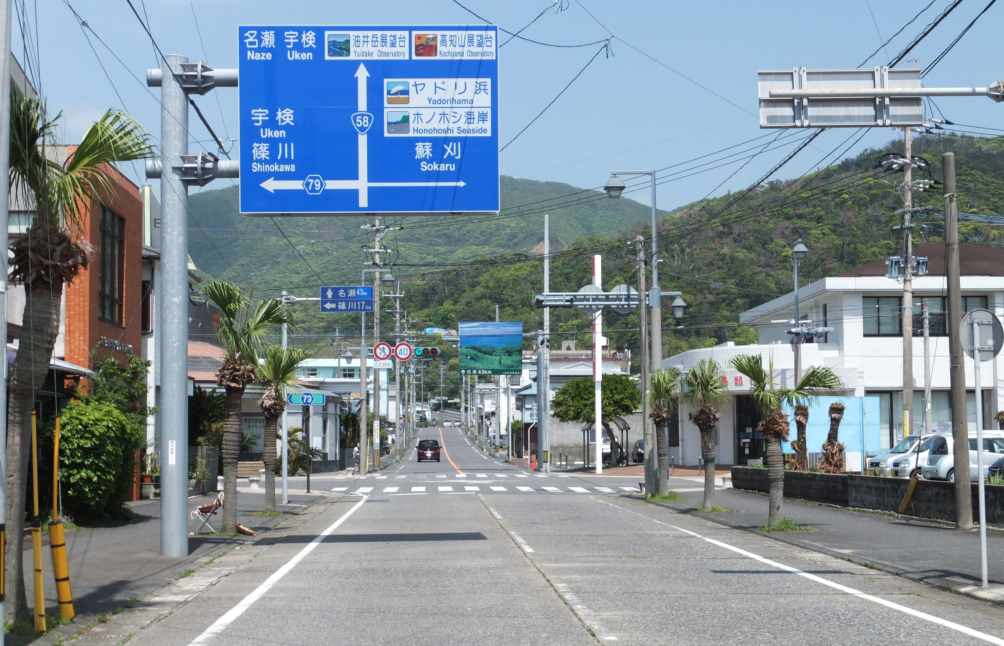 瀬戸内町 奄美大島の国道58号線終点、県道79号線の終点